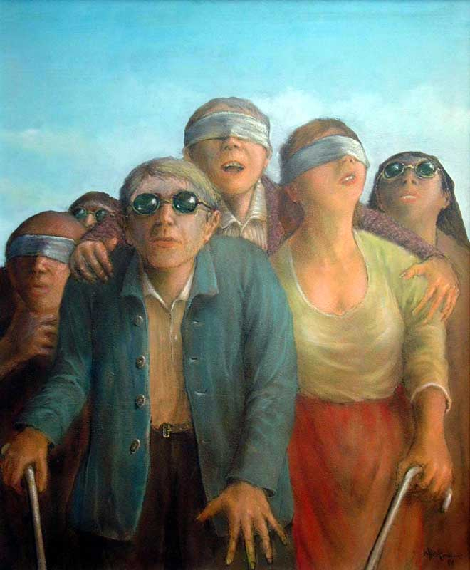 Walter Heckmann, Maler, Der blinde führt die Blinden von 1991, Mischtechnik, 50x60cm